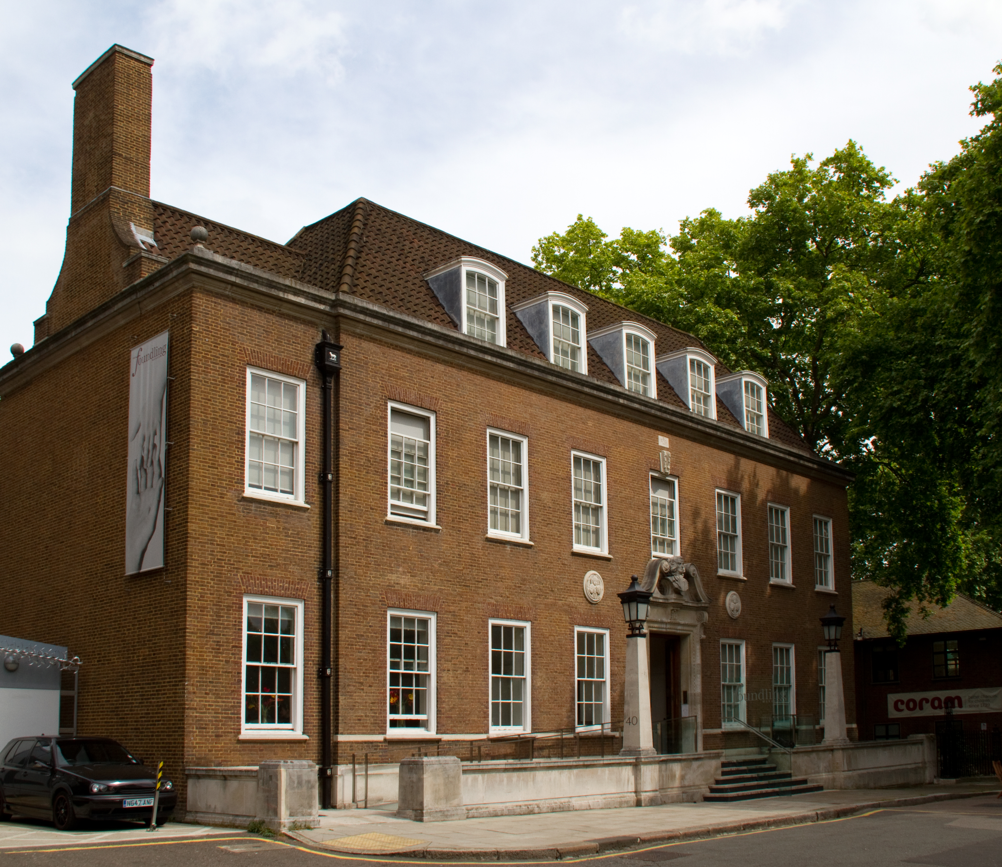 Foundling Museum